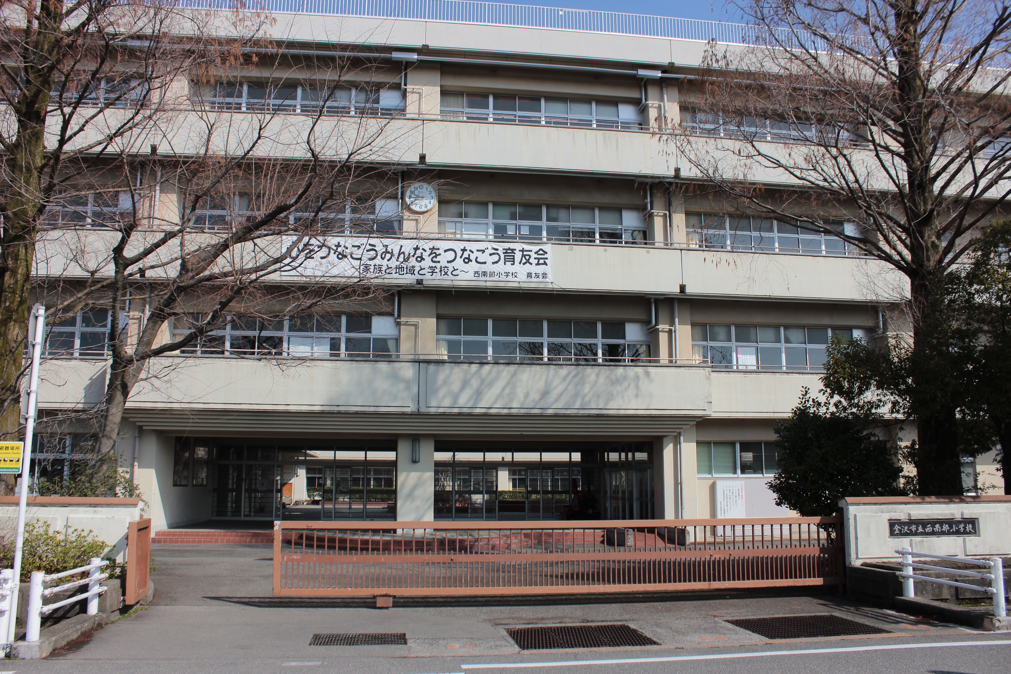 金沢市立西南部小学校（石川県金沢市） Canon EOS Kiss X5